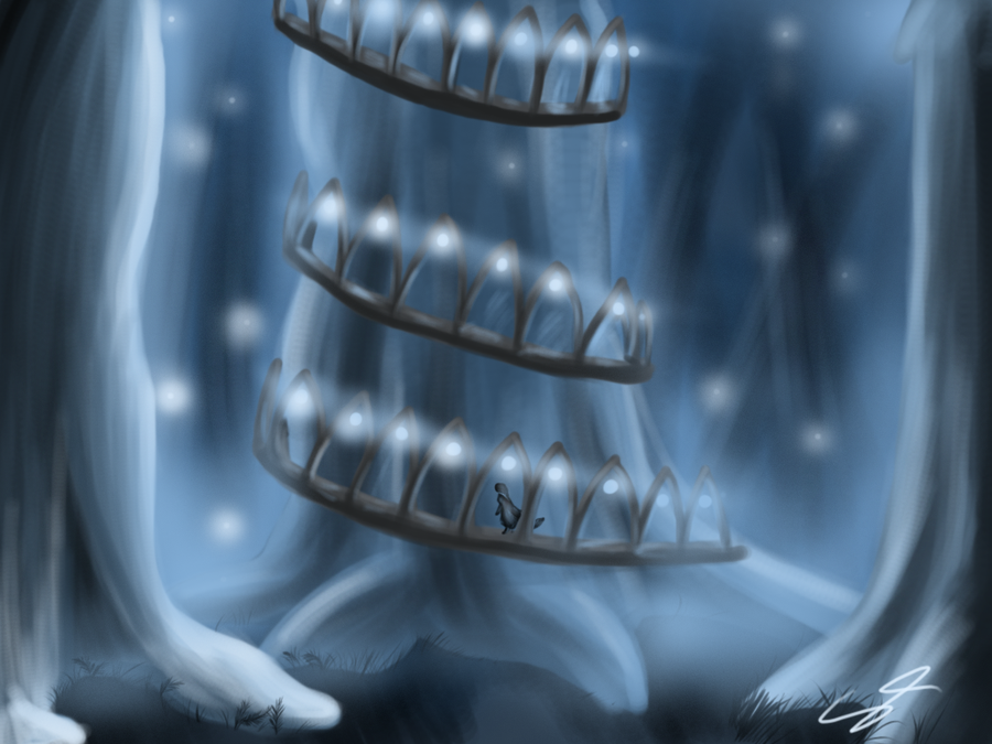 Lothlórien